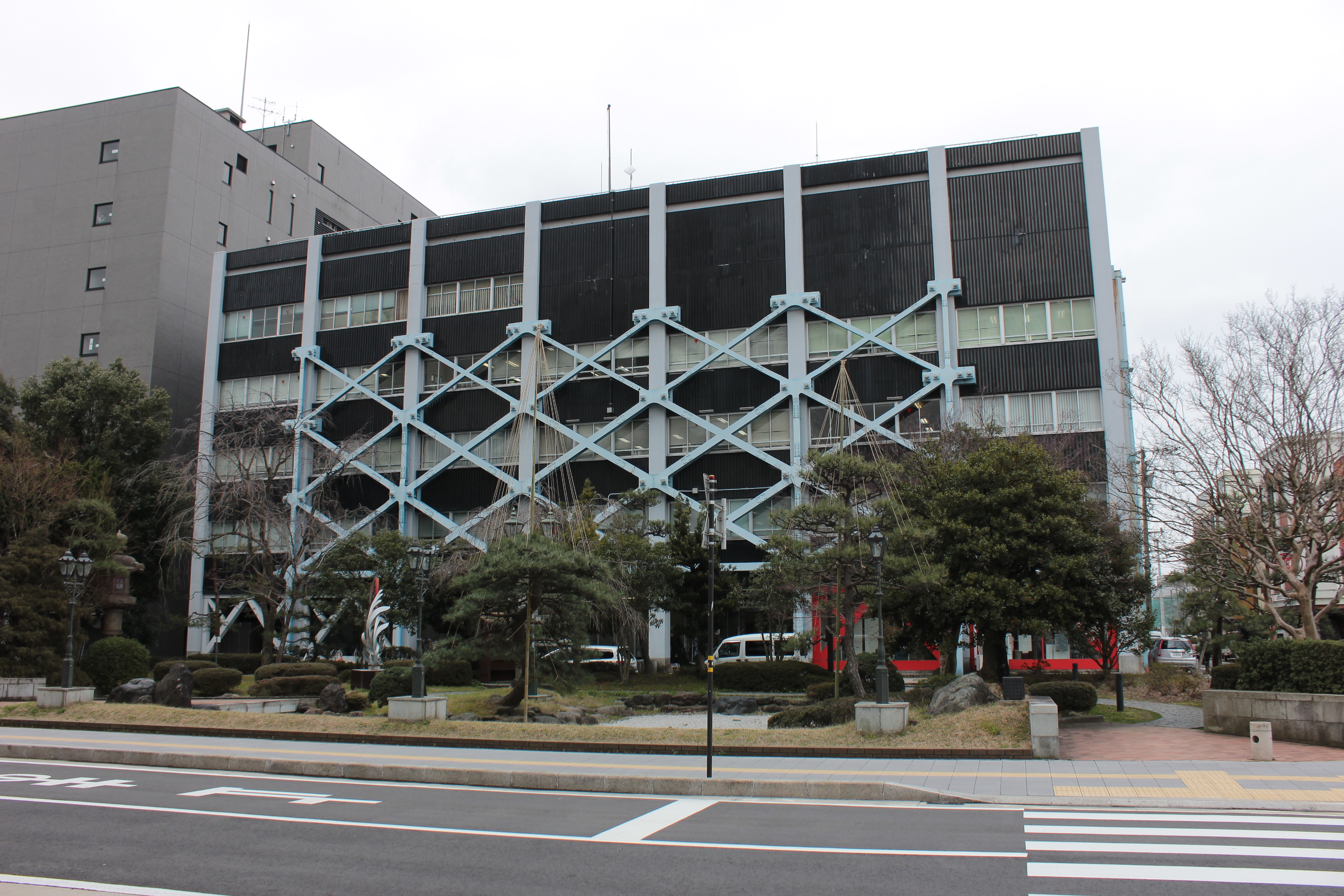 福井市企業局庁舎（福井県福井市） Canon EOS Kiss X5